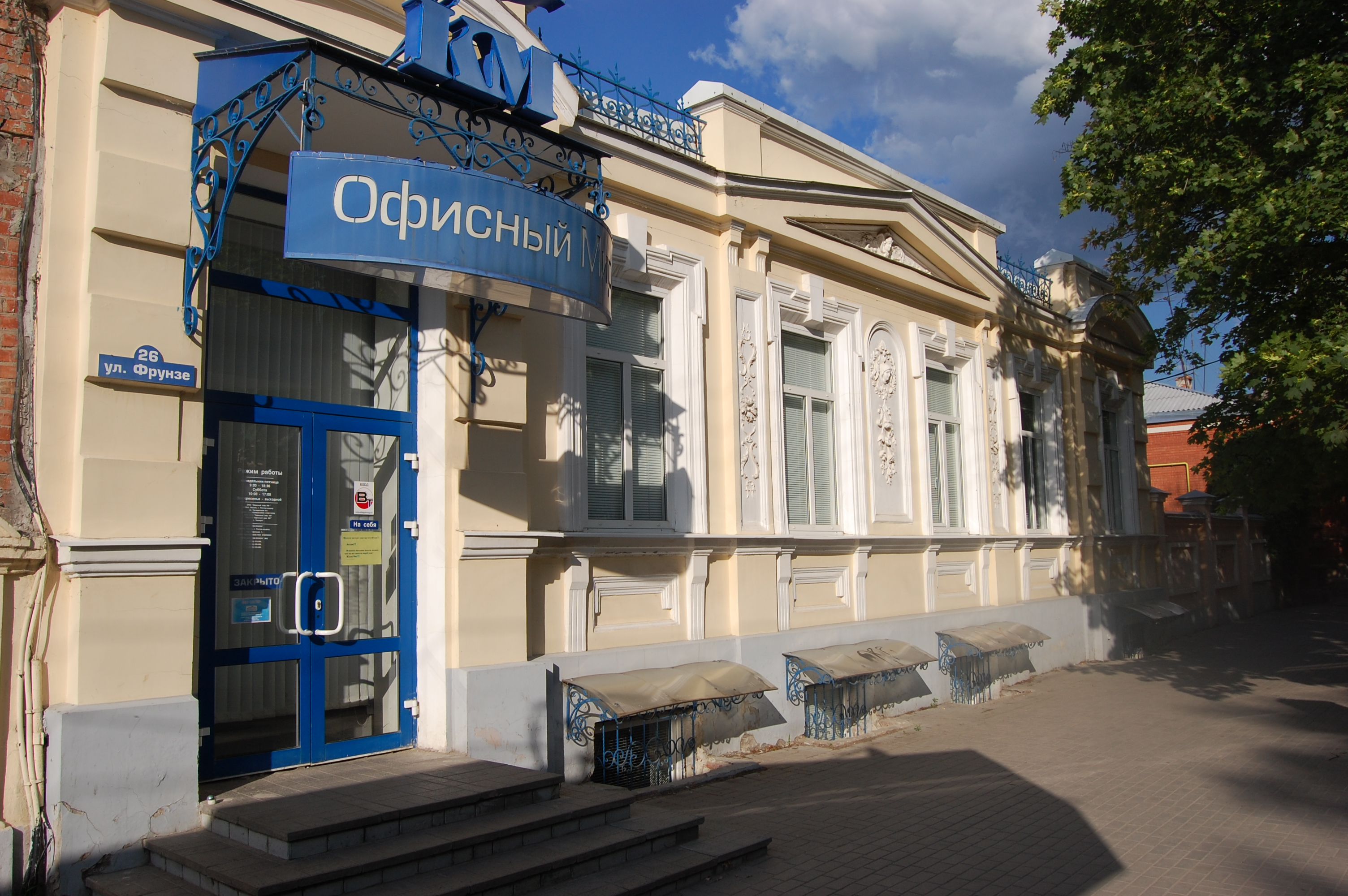 Фасад особняка "Дом Апостолопуло", Таганрог, 2012